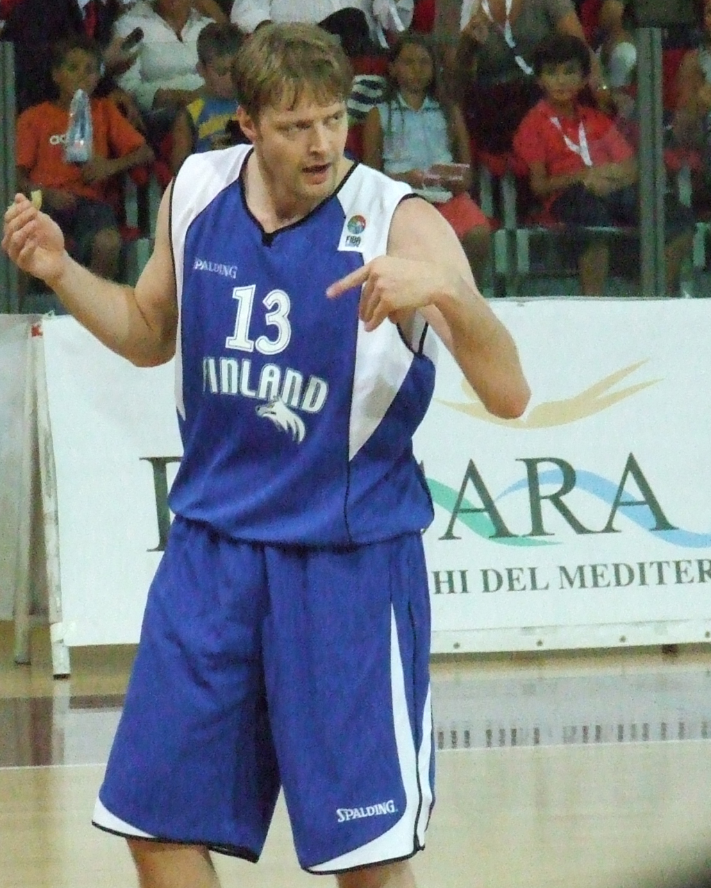 Finnish basketball player, Hanno Möttölä, in Finland national basketballteam uniform.